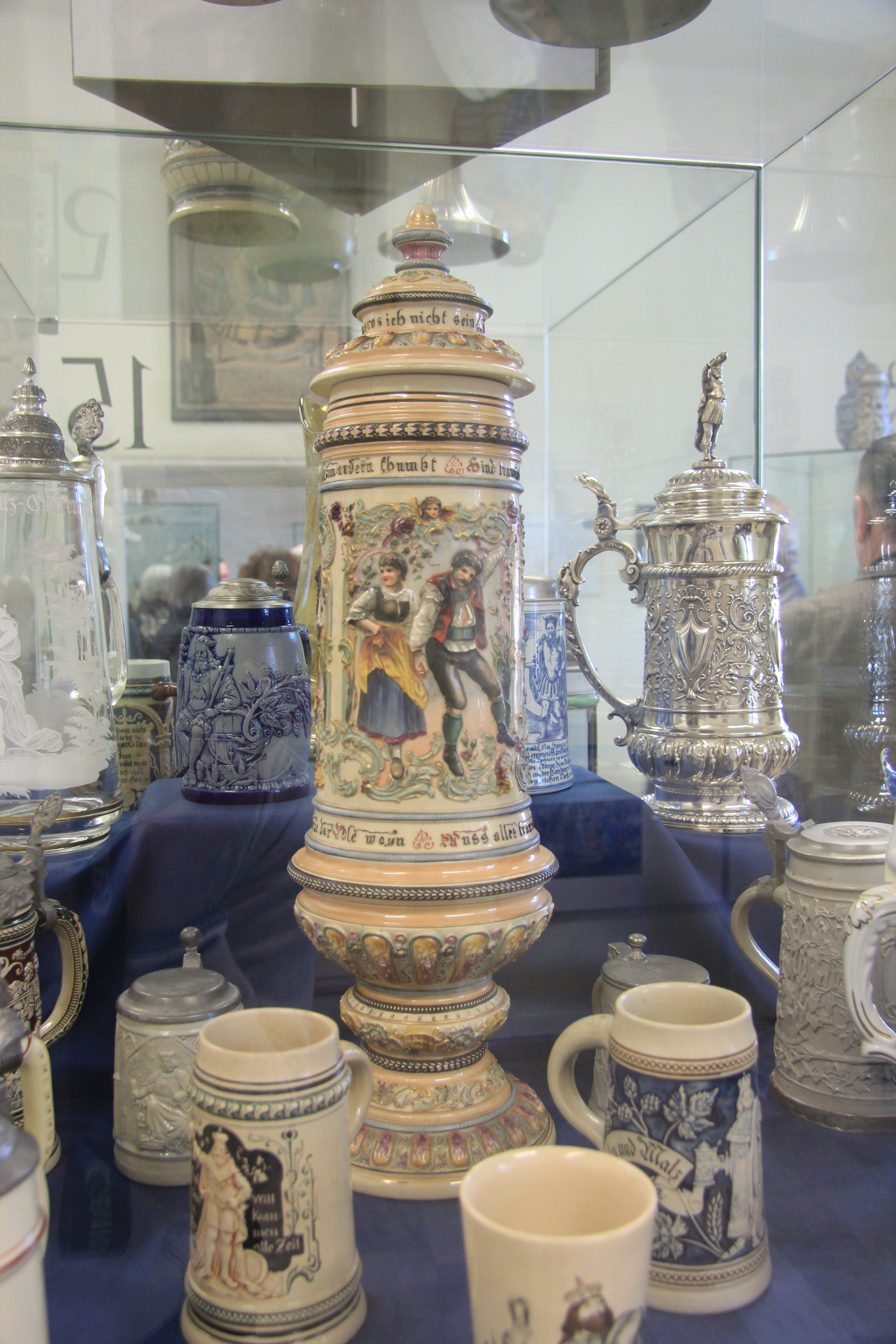 Exponate im Bierkrugmuseum in Hainfeld, Niederösterreich